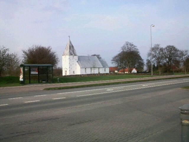 Seest Kirke (jeg undskylder billedets kvalitet... jeg dummede mig)